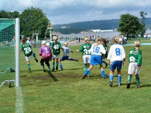 Oddebollen år 2003. Landbadet vid Gustafsberg i Uddevalla i bakgrunden.